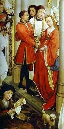 (Wedding) - From The Seven Sacraments picture, by Rogier van der Weyden, Koninklijk Museum voor Schone Kunsten, Antuerp